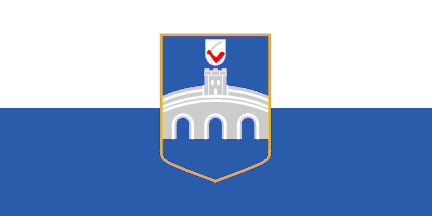 Flago de Osijek.